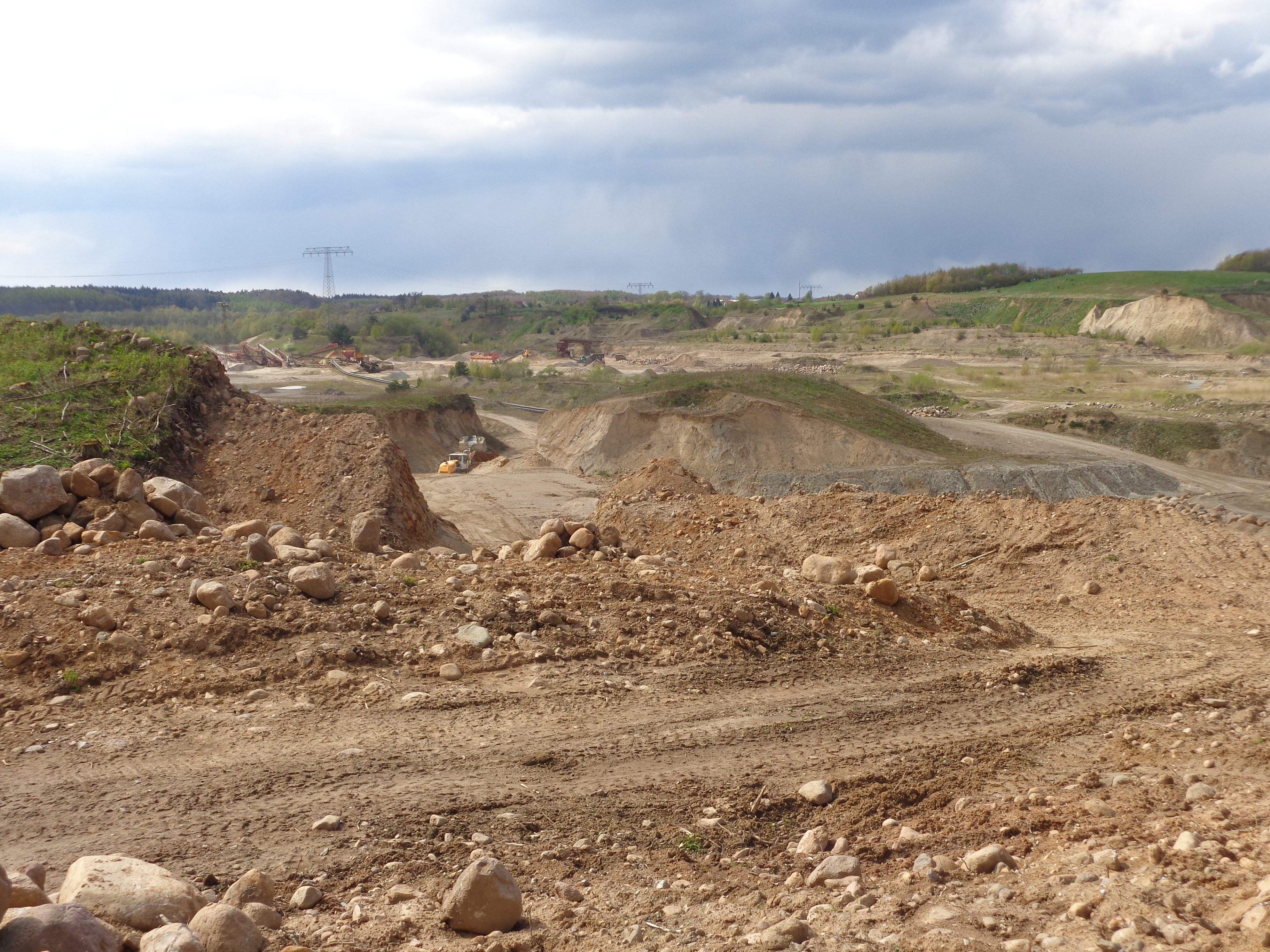 Kieswerk der HeidelbergCement AG in Langhagen, Abbaufeld im Trockenschnitt der Anlage Wolff 1.